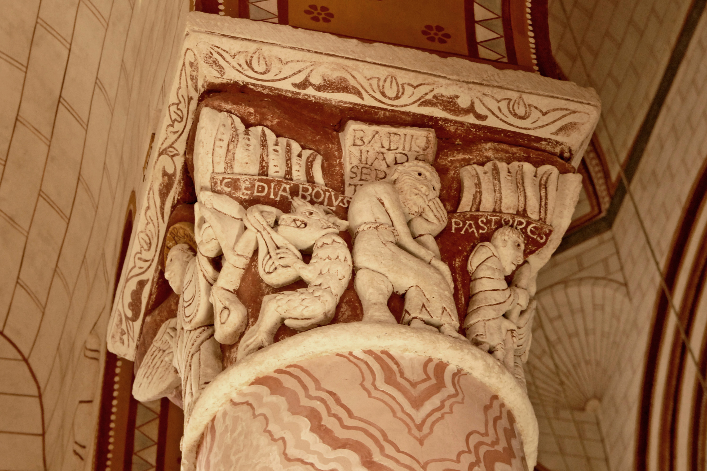 Kapitell II